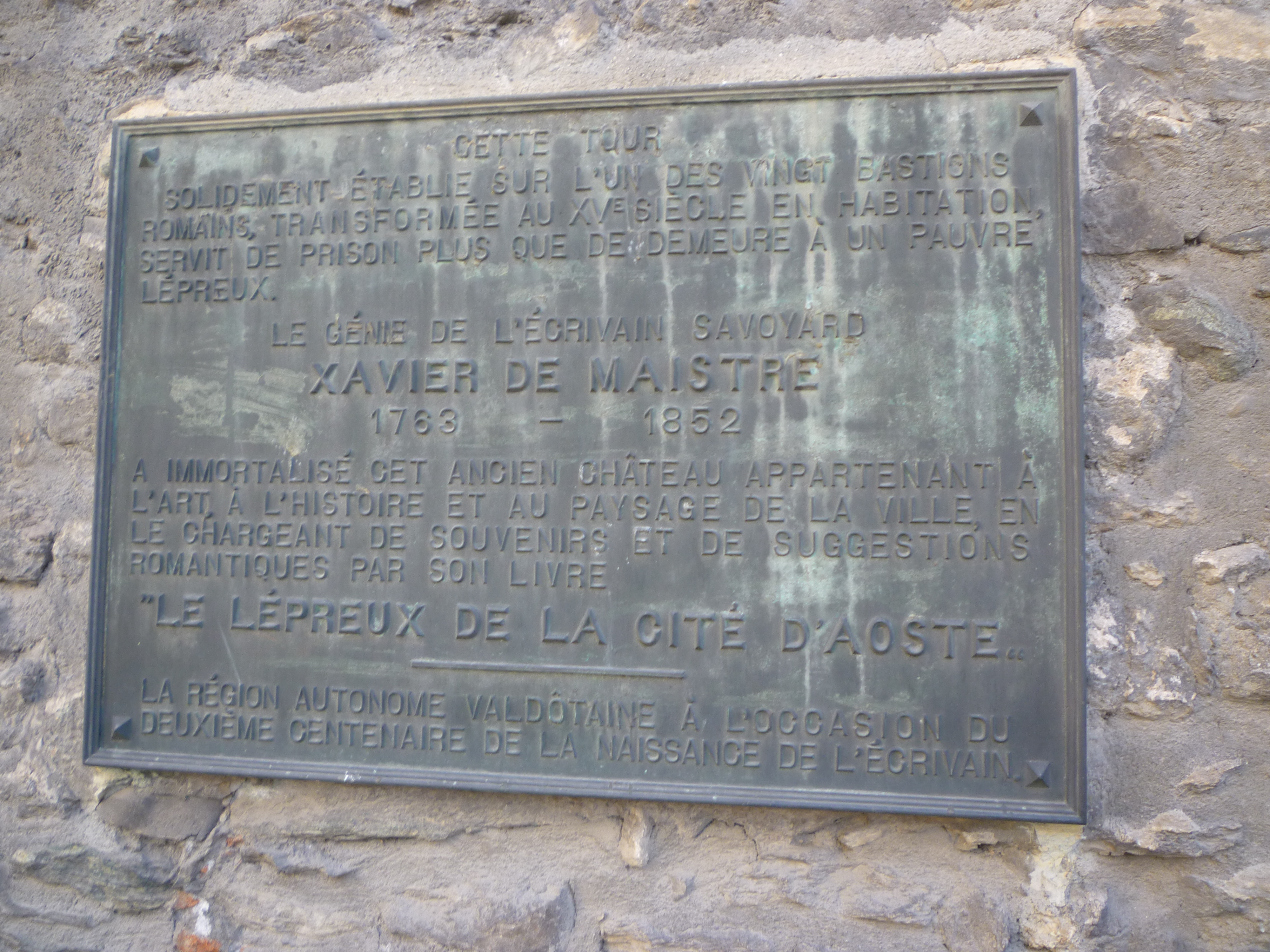 Plaque en souvenir de l'écrivain savoyard Xavier de Maistre sur la tour du lépreux à Aoste (Vallée d'Aoste - Italie)